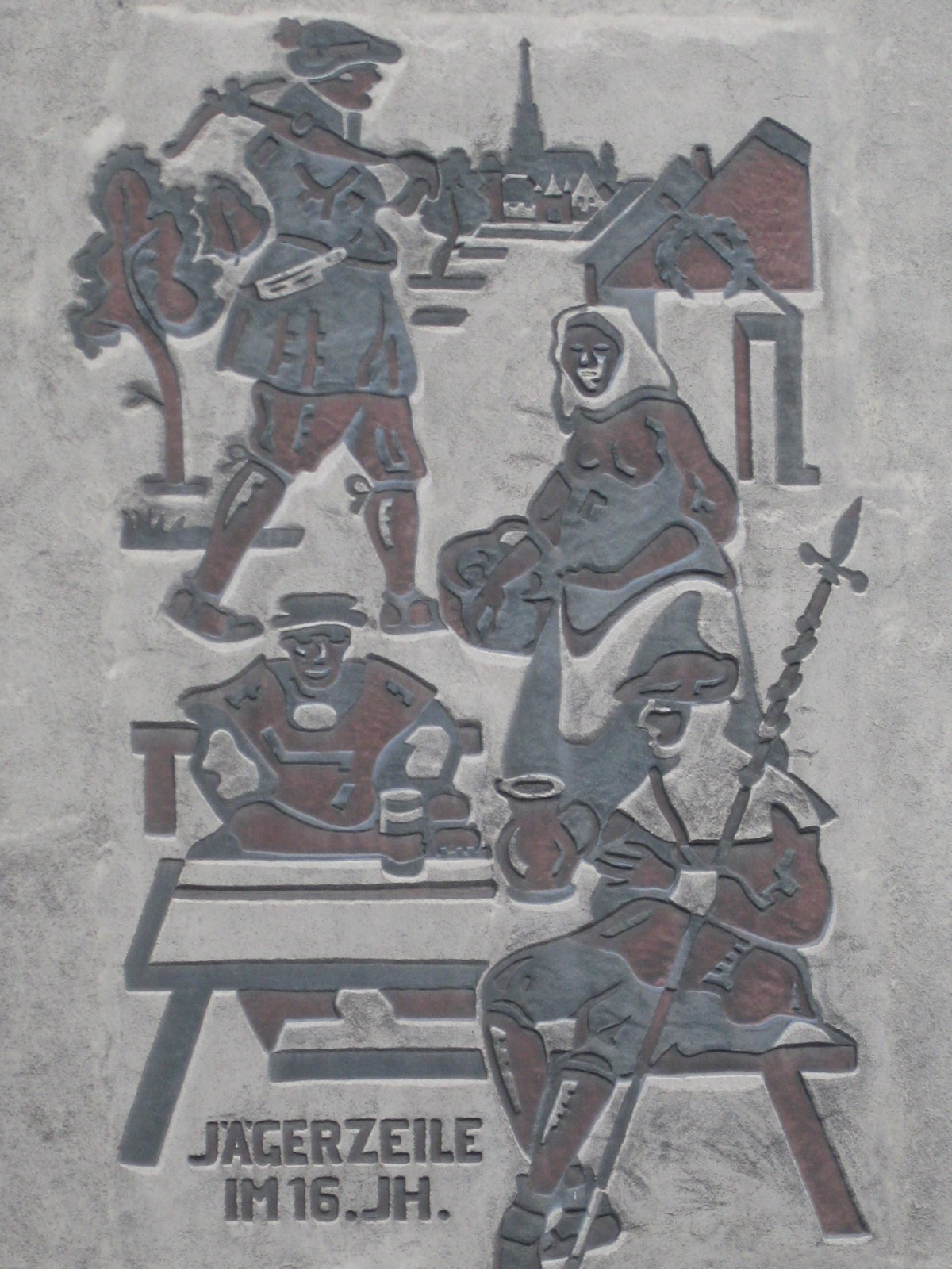 Wandrelief "Jägerzeile im 16. Jahrhundert"